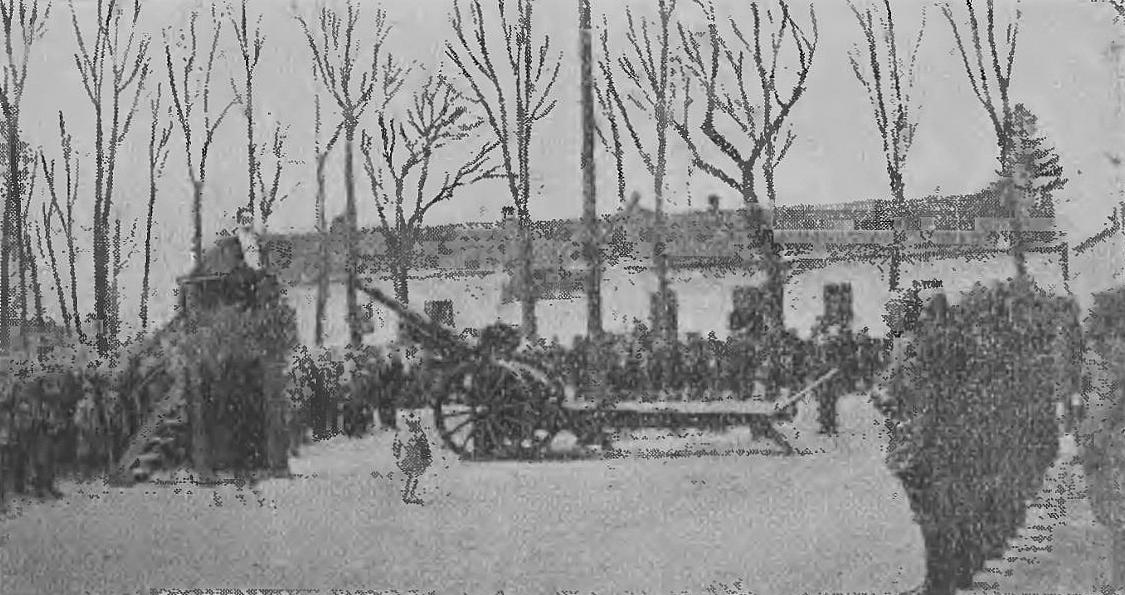 Przysięga na działo kanonierów 10 pułku art. ciężkiej (-1933)